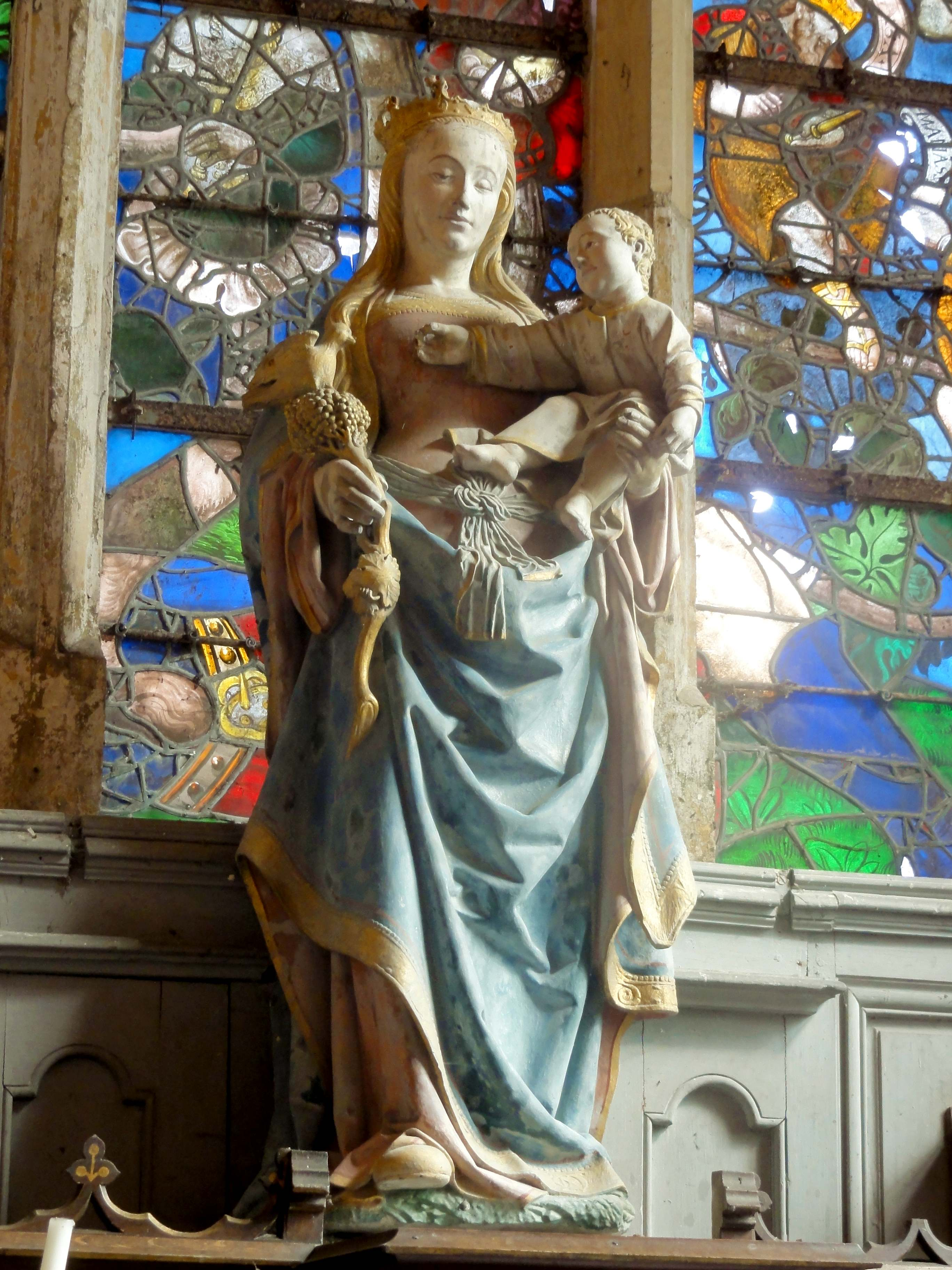 Vierge à l'Enfant en pierre polychrome, XVIe siècle.